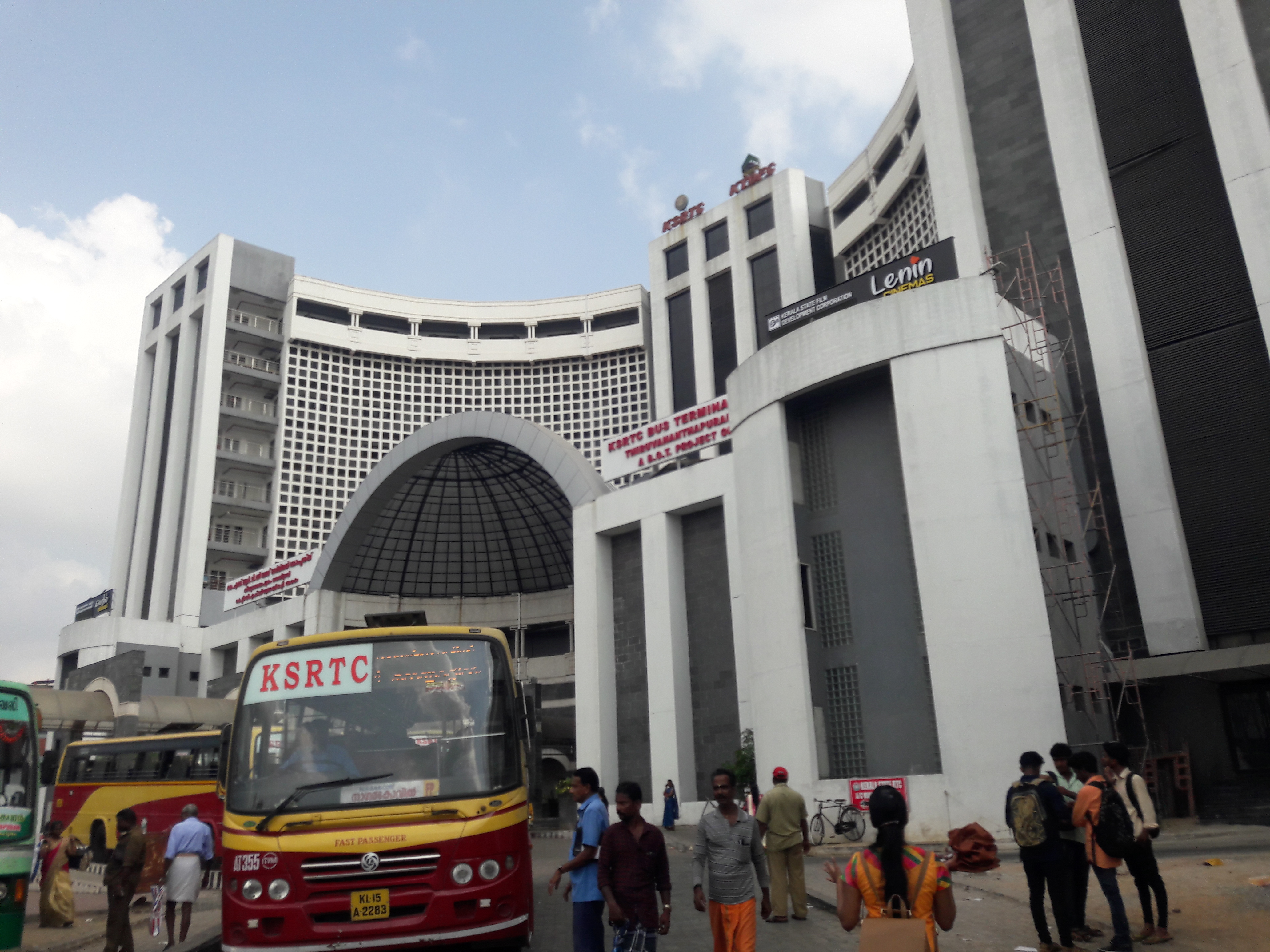 കേരള സ്റ്റേറ്റ് റോഡ് ട്രാൻസ്പോർട്ട് കോർപ്പറേഷൻ തിരുവനന്തപുരം.